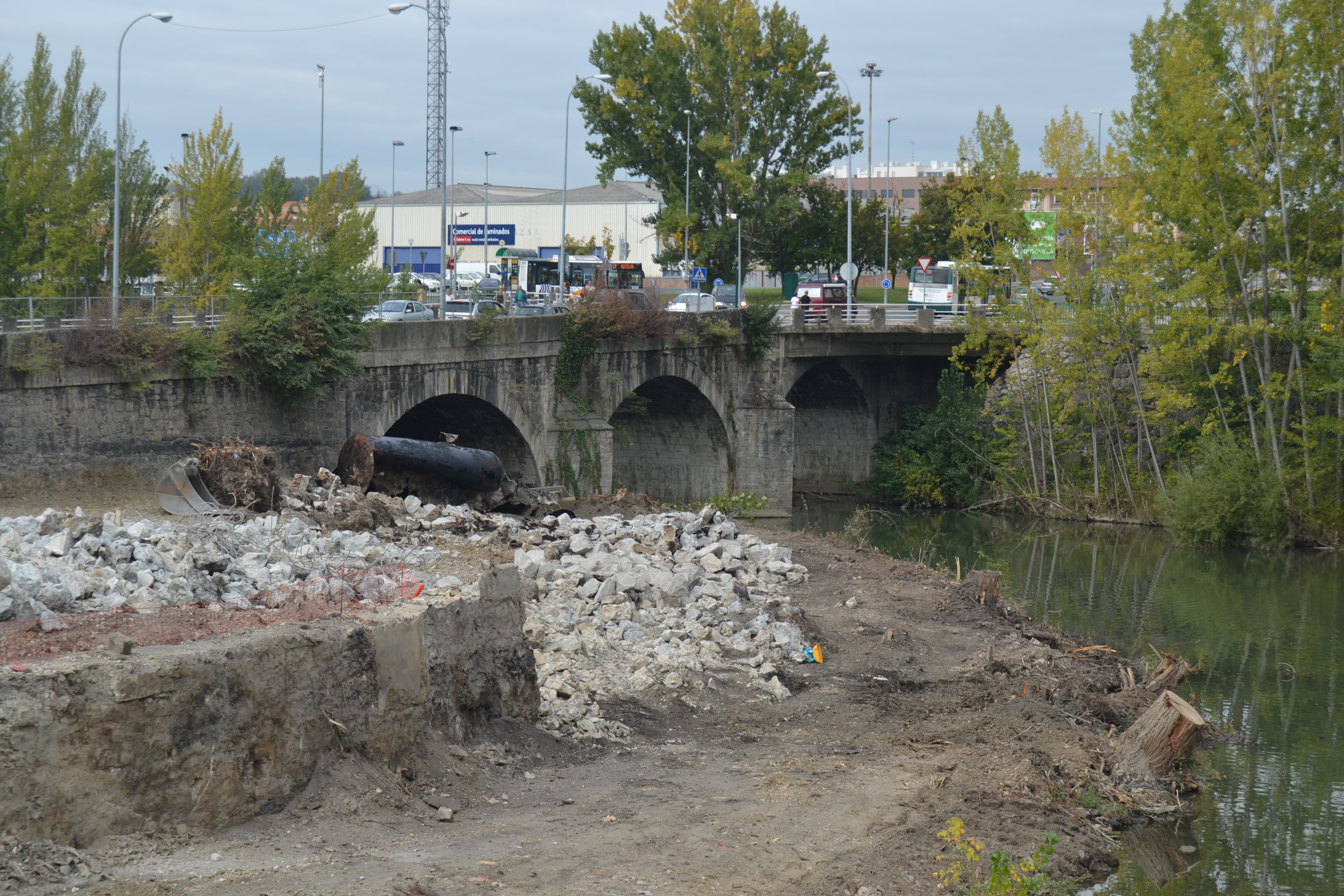 Cuatro Vientos zubia. Iruñea, Nafarroa. Euskal Herria.